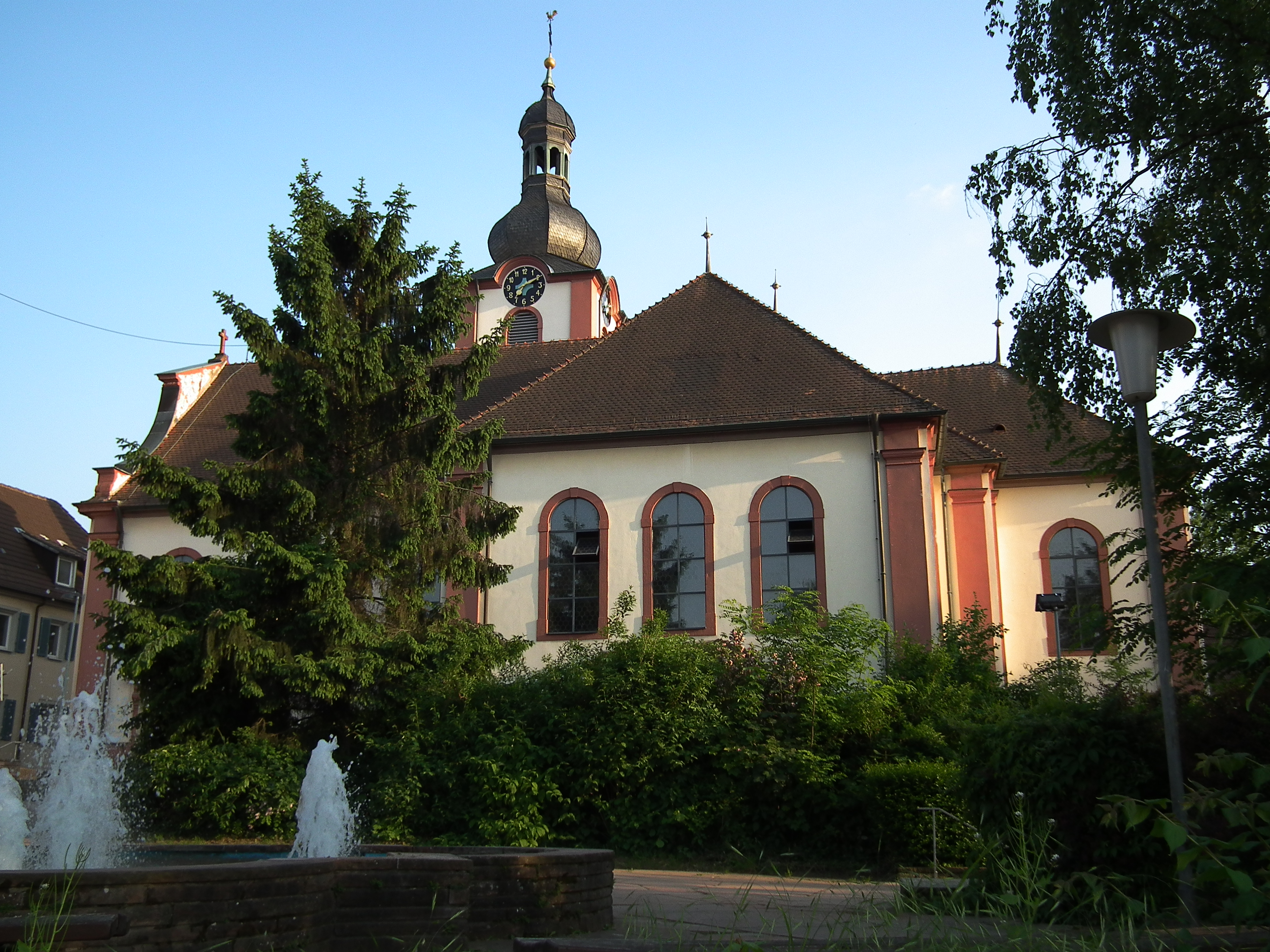 Katholische Kirche St. Laurentius in Nußloch (Baden-Württemberg, Deutschland)